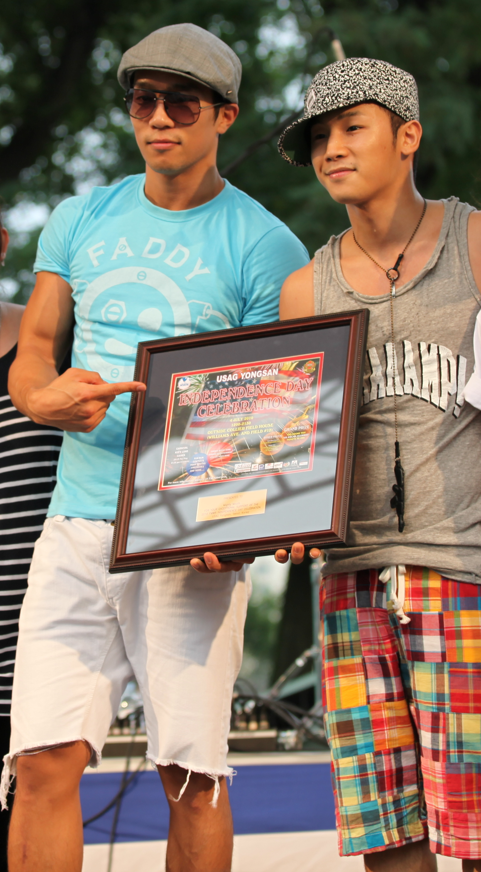 음악그룹 마이티 마우스 . 왼쪽은 상추 , 오른쪽은 쇼리 J